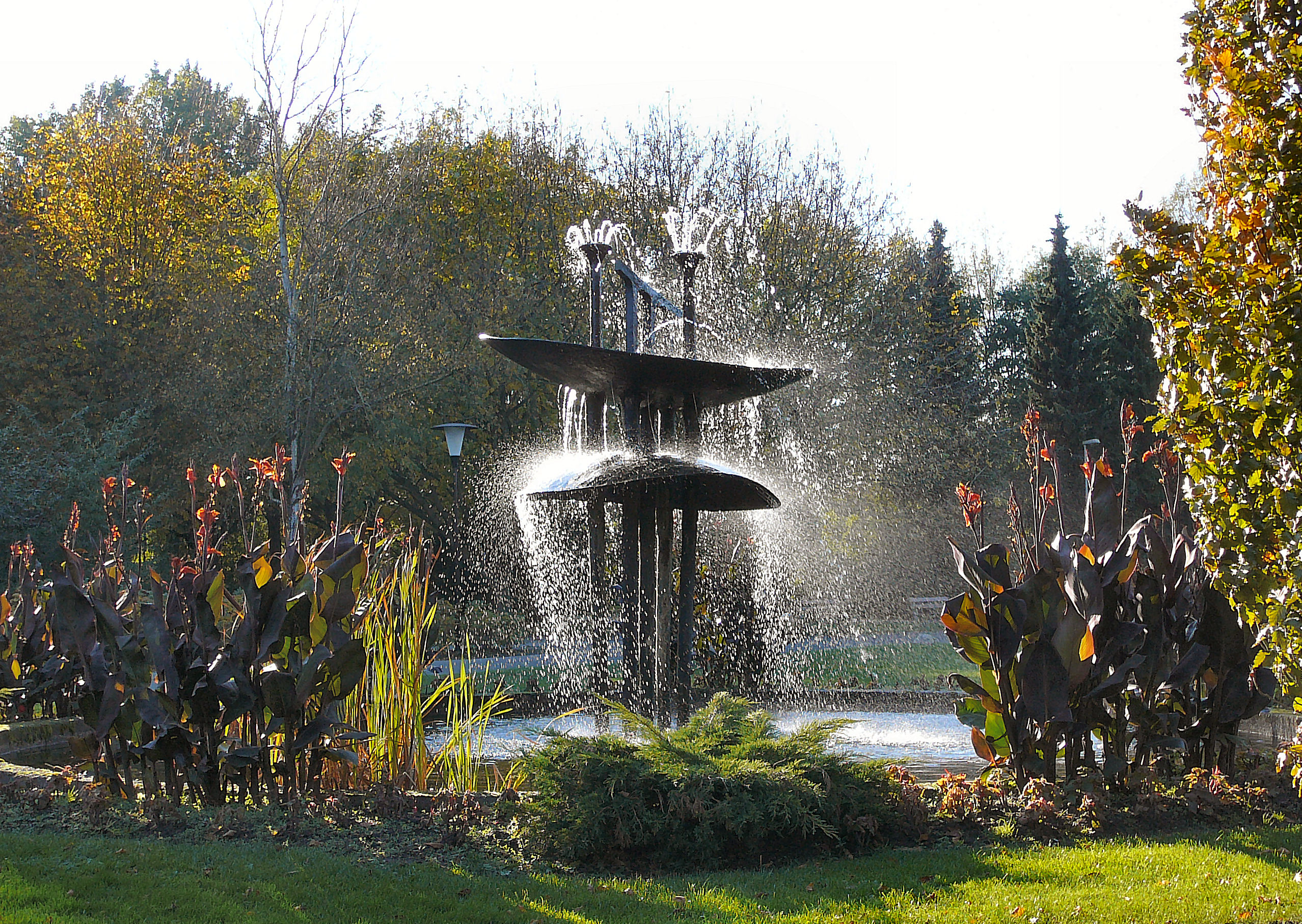 Fontein op Selwerderhof